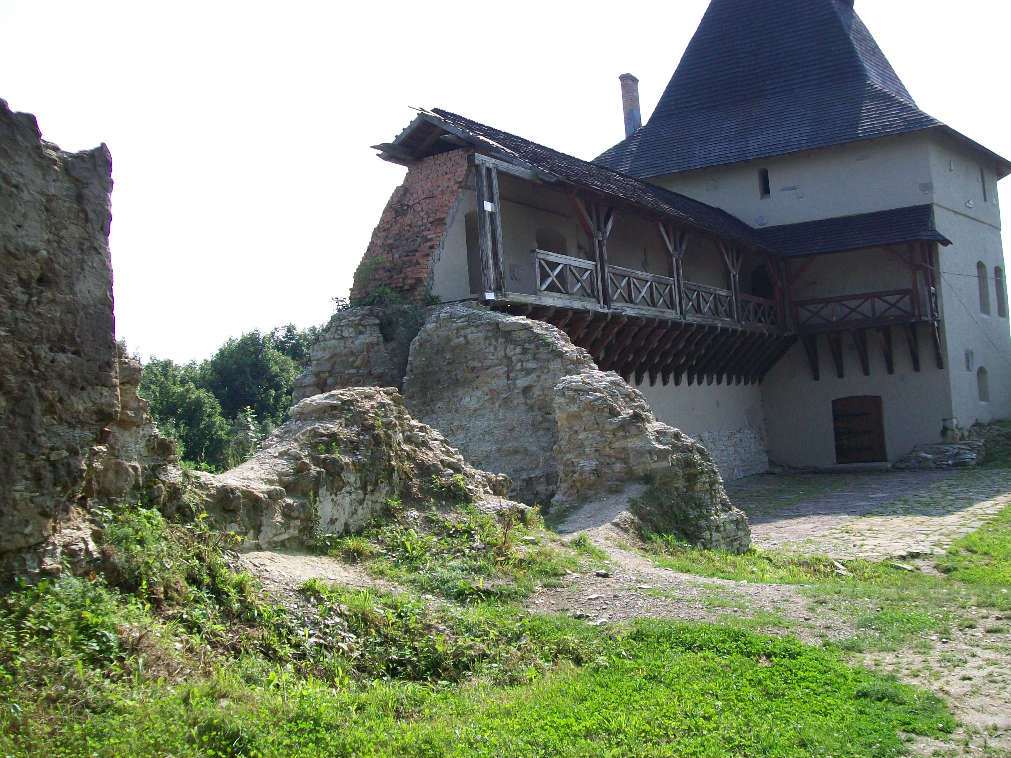 Die Reste der alten Burg in Halitsch (Ukraine)